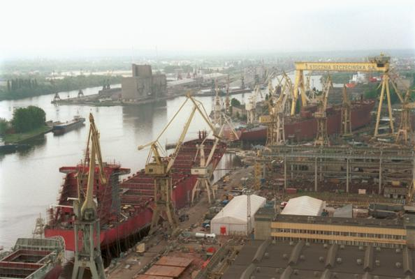 Stocznia Szczecińska Nowa (Szczecin Shipyard)